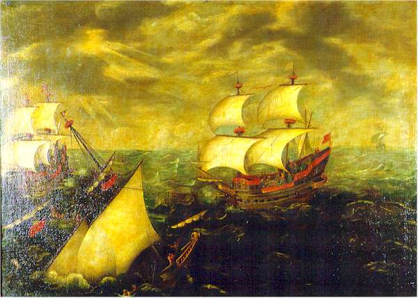 Combate naval entre españoles y holandeses (s. XVII). También quizás parte de una obra de mayores dimensiones; en primer término, un navío se va a pique de popa y, en segundo plano, dos navíos combaten a distancia apreciable. Como el óleo anterior, se creía representar la segunda fase del combate de Fuengirola, a todas luces erróneo, pues ni la mano del pintor, distinta y de inferior calidad, ni la composición y tipo de los navíos pueden apoyar ese supuesto. Se ignora la procedencia y fecha de ingreso en el Museo.